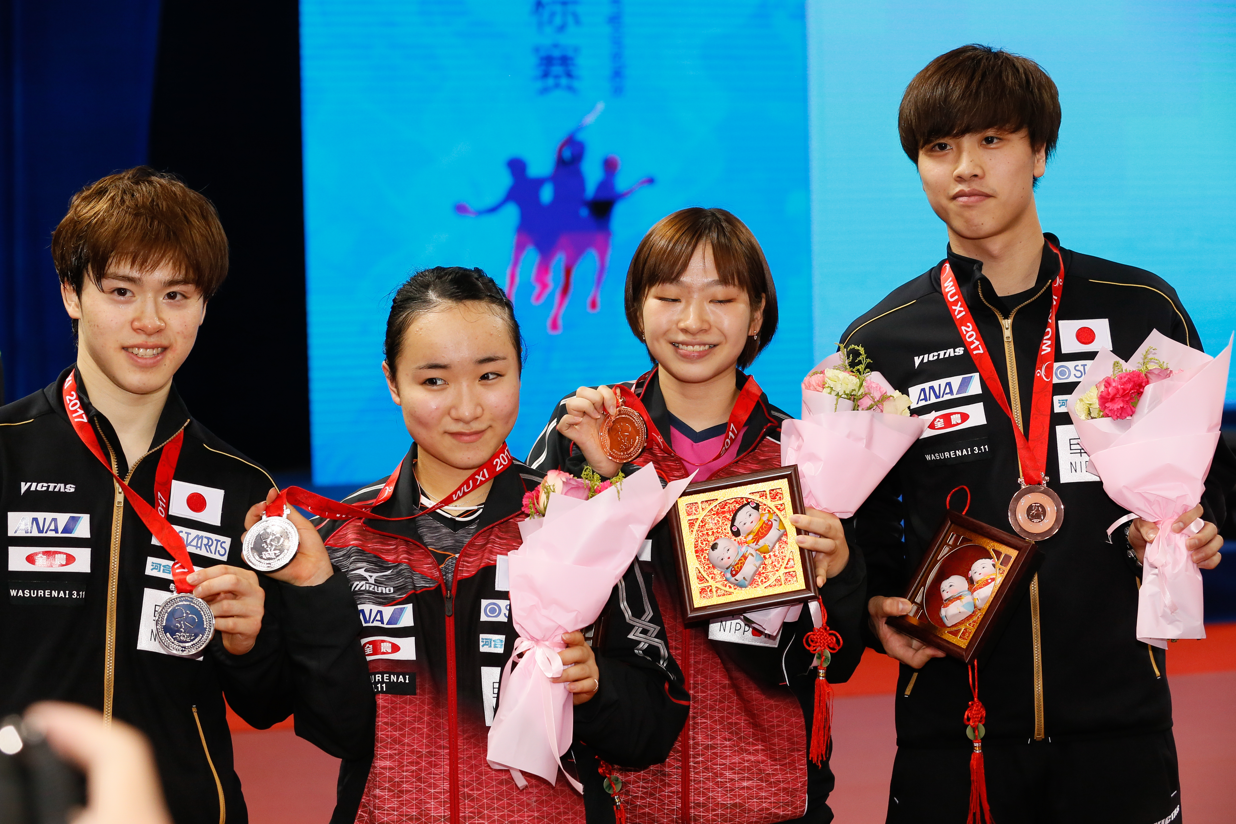 _K0K0235